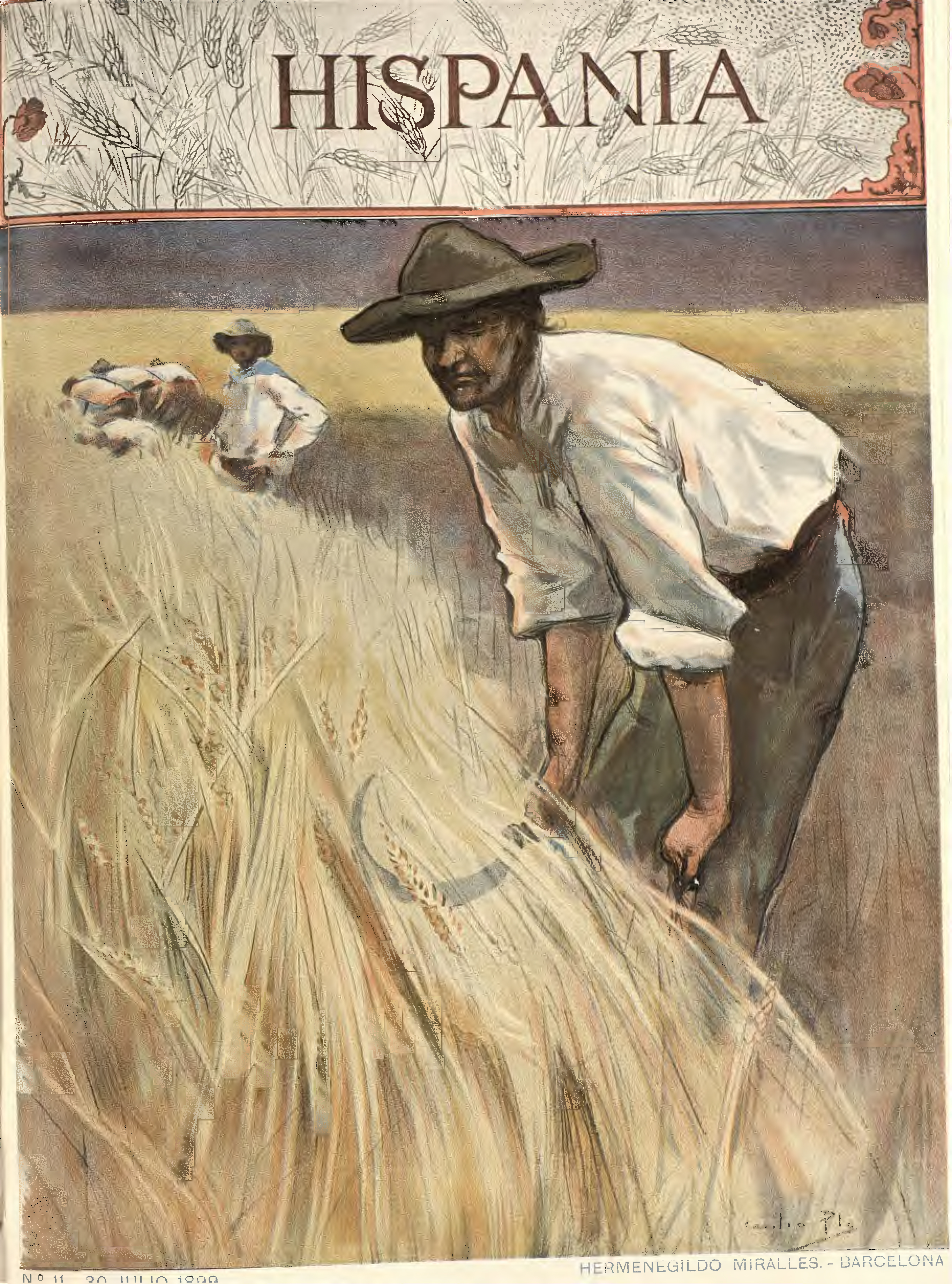 Hispania.